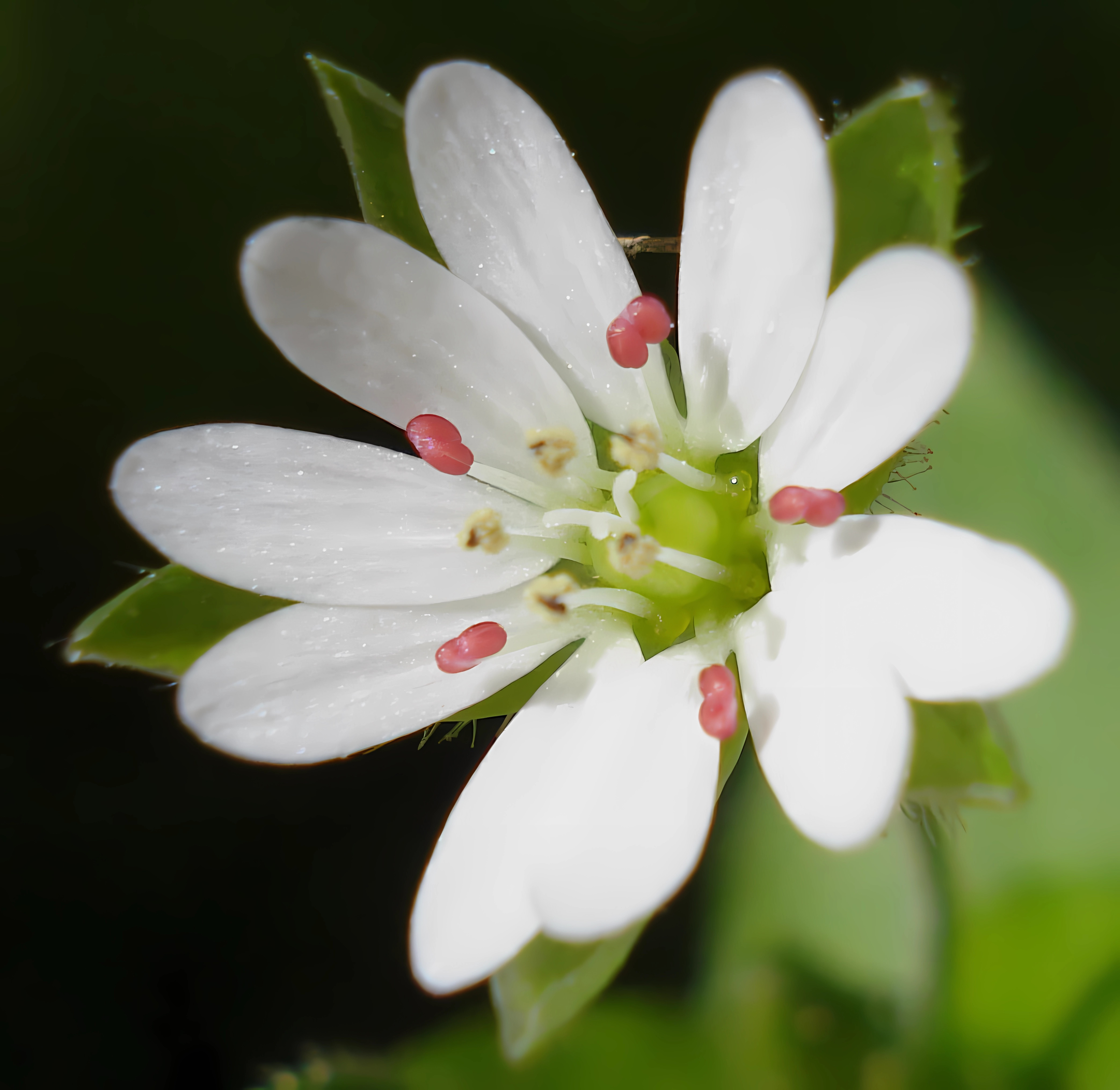 Stellaria neglecta (Unterfranken, Germany)